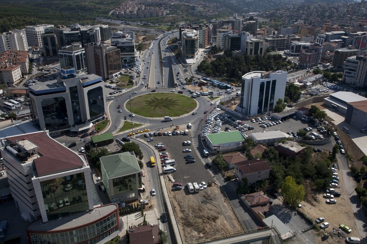 Kavacık